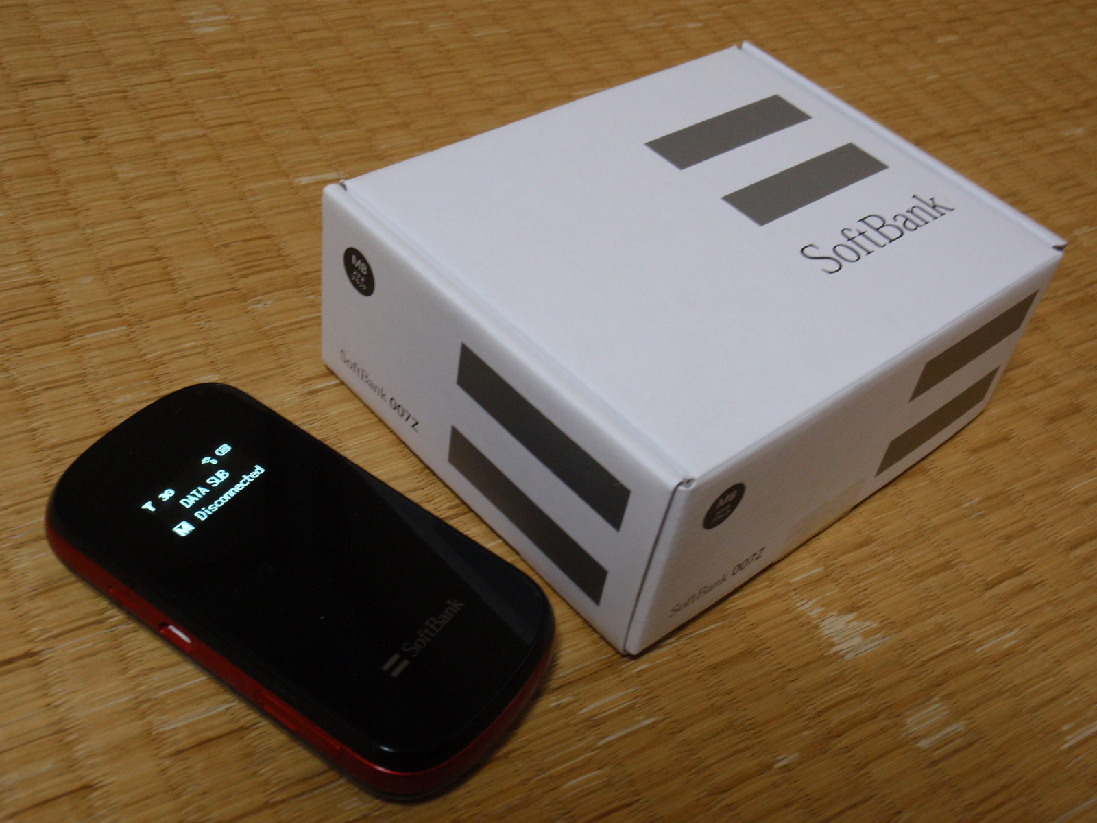 Softbank 007Z モバイルWi-Fiルーター本体＋外箱